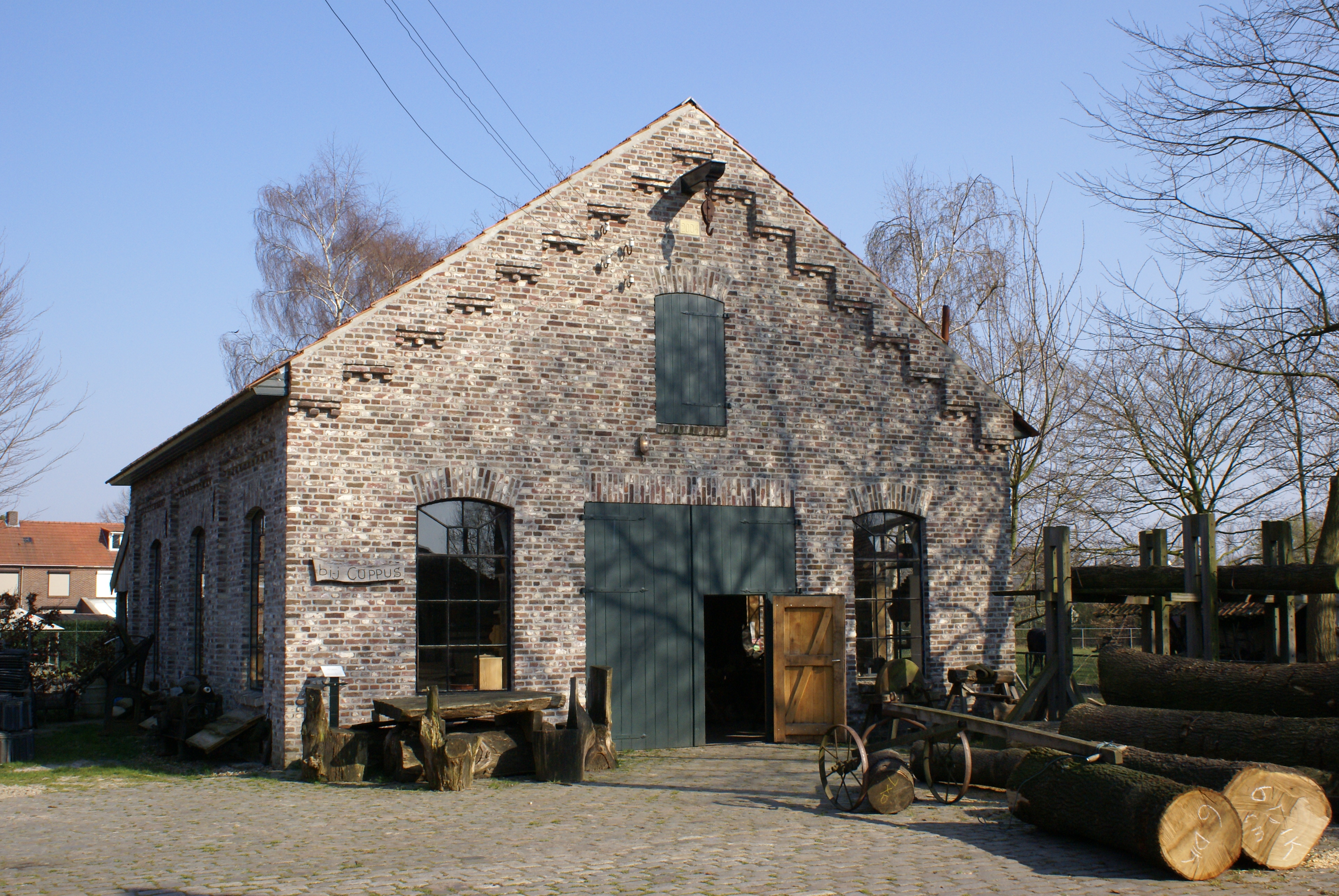 Limburgs Openluchtmuseum Eynderhoof, voorzijde van het gebouw "Bi-j Cöppus". De houtdraaier, klompenmaker, kuiper, gereedschappenmaker en houtsnijder hebben hier hun huis.